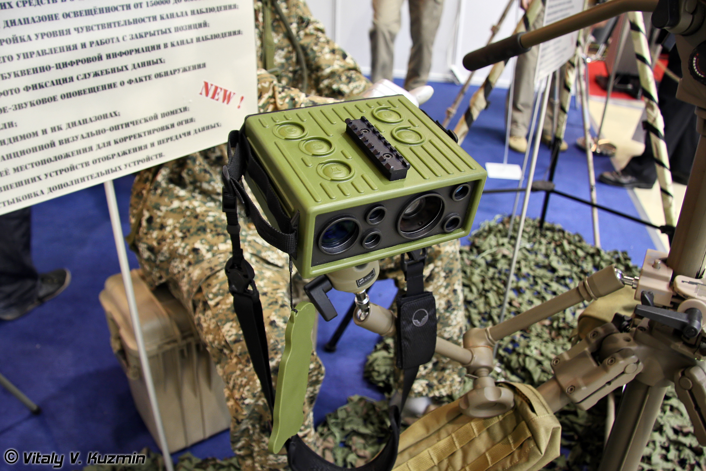 Прибор обнаружения оптических средств и наблюдения Антиснайпер (Antisniper surveillance and detection of optical systems device)